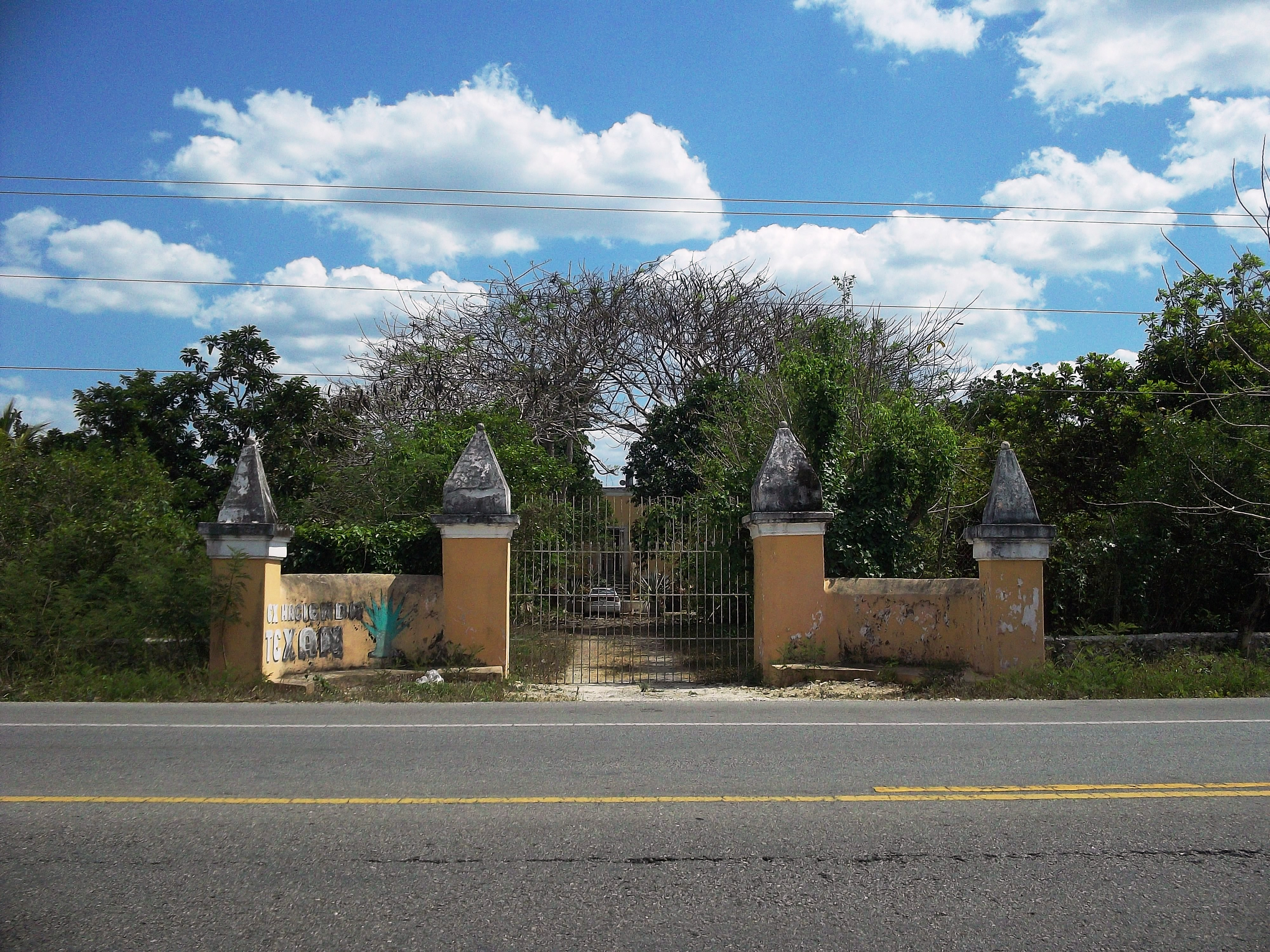 Entrada de la hacienda Texán, Yucatán.